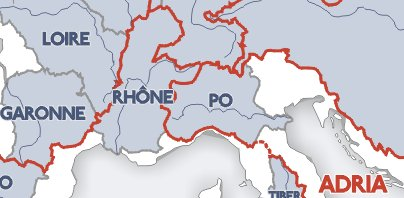 Alpenhauptkamm